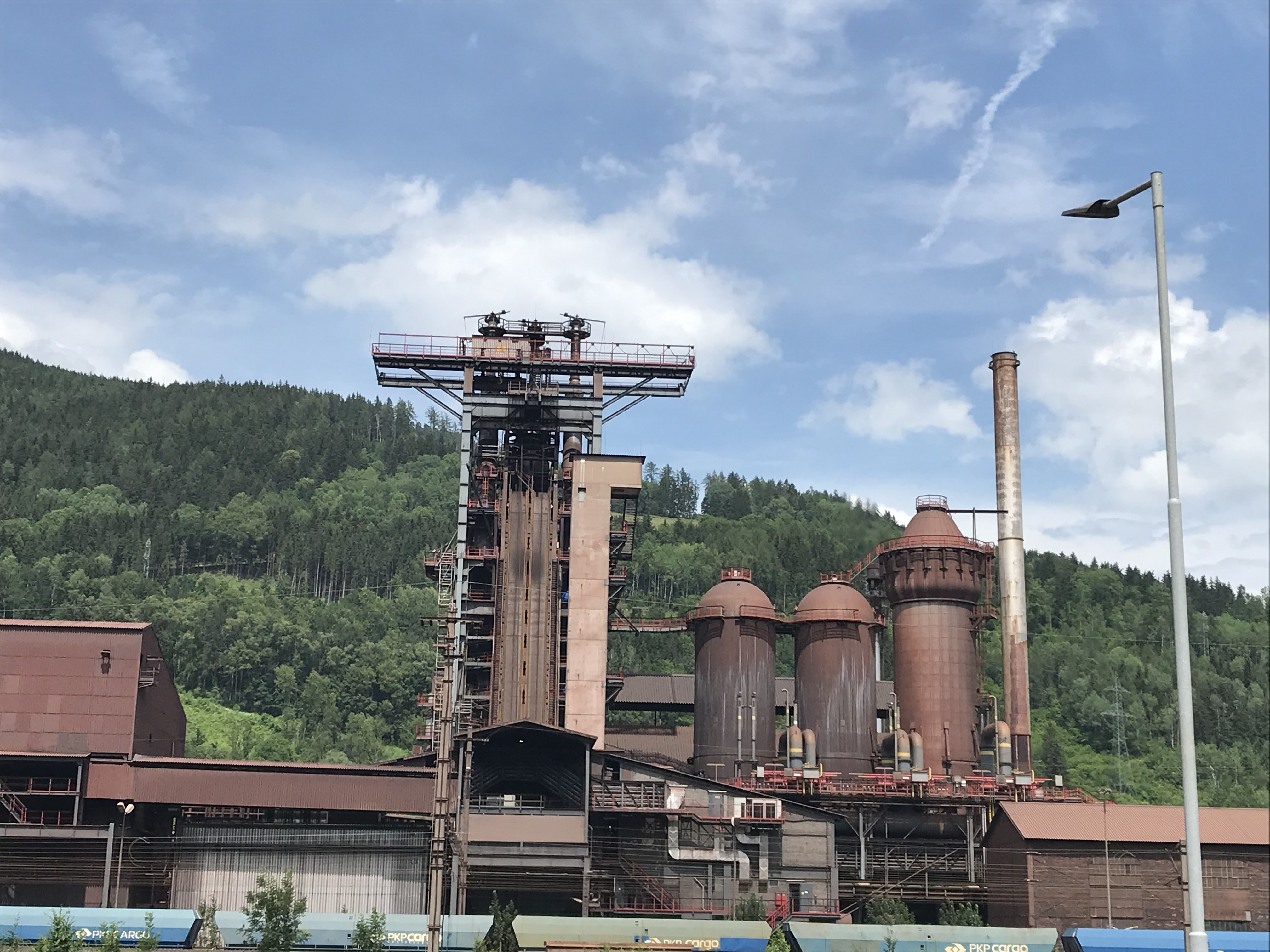 Einer der beiden Hochöfen im Stahlwerk Donawitz.